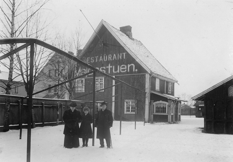 Restaurant Majorstuen, ca. 1913